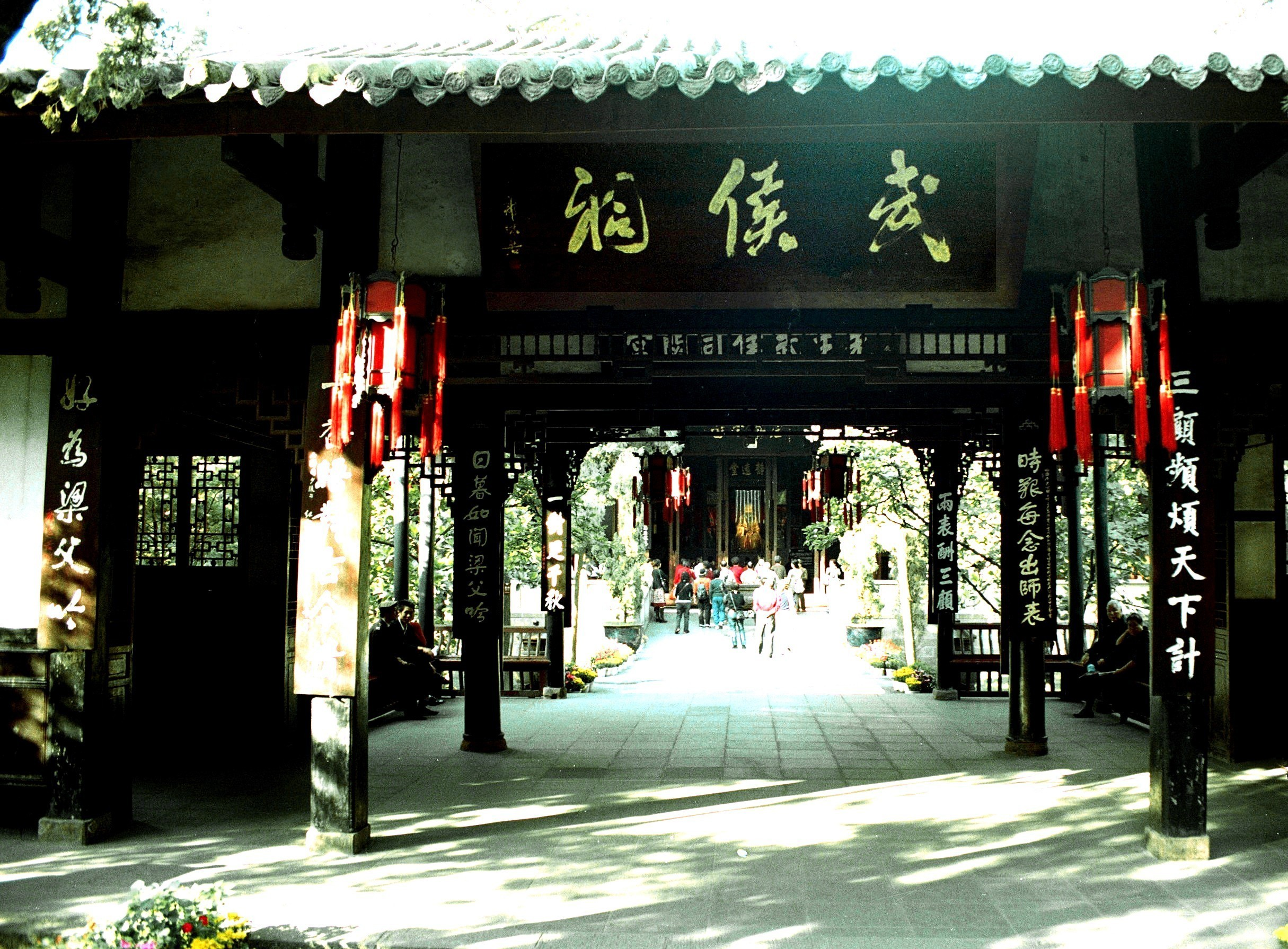 成都武侯祠